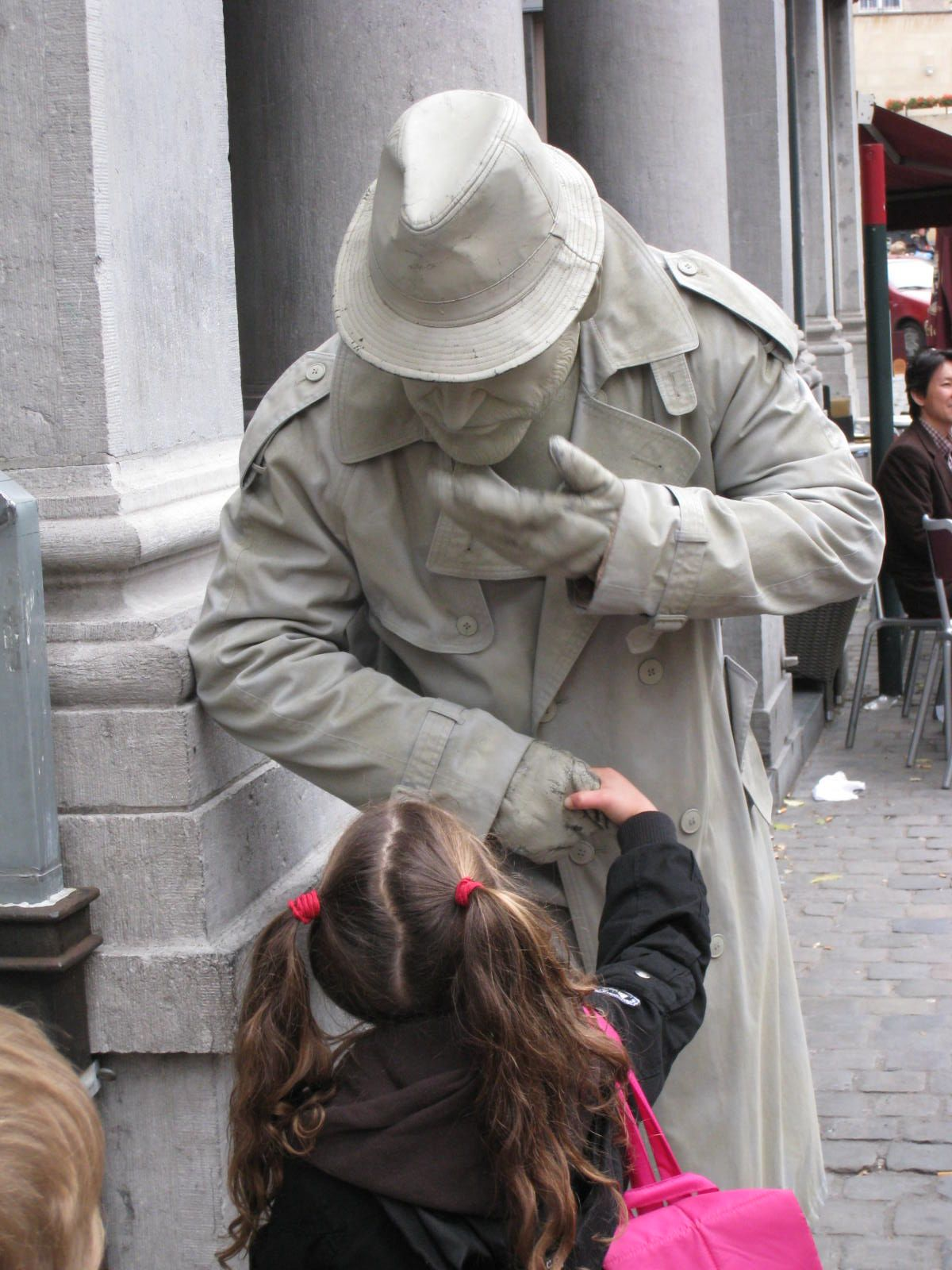 Levend standbeeld te Brussel voor de St.-Hubertusgallerijen